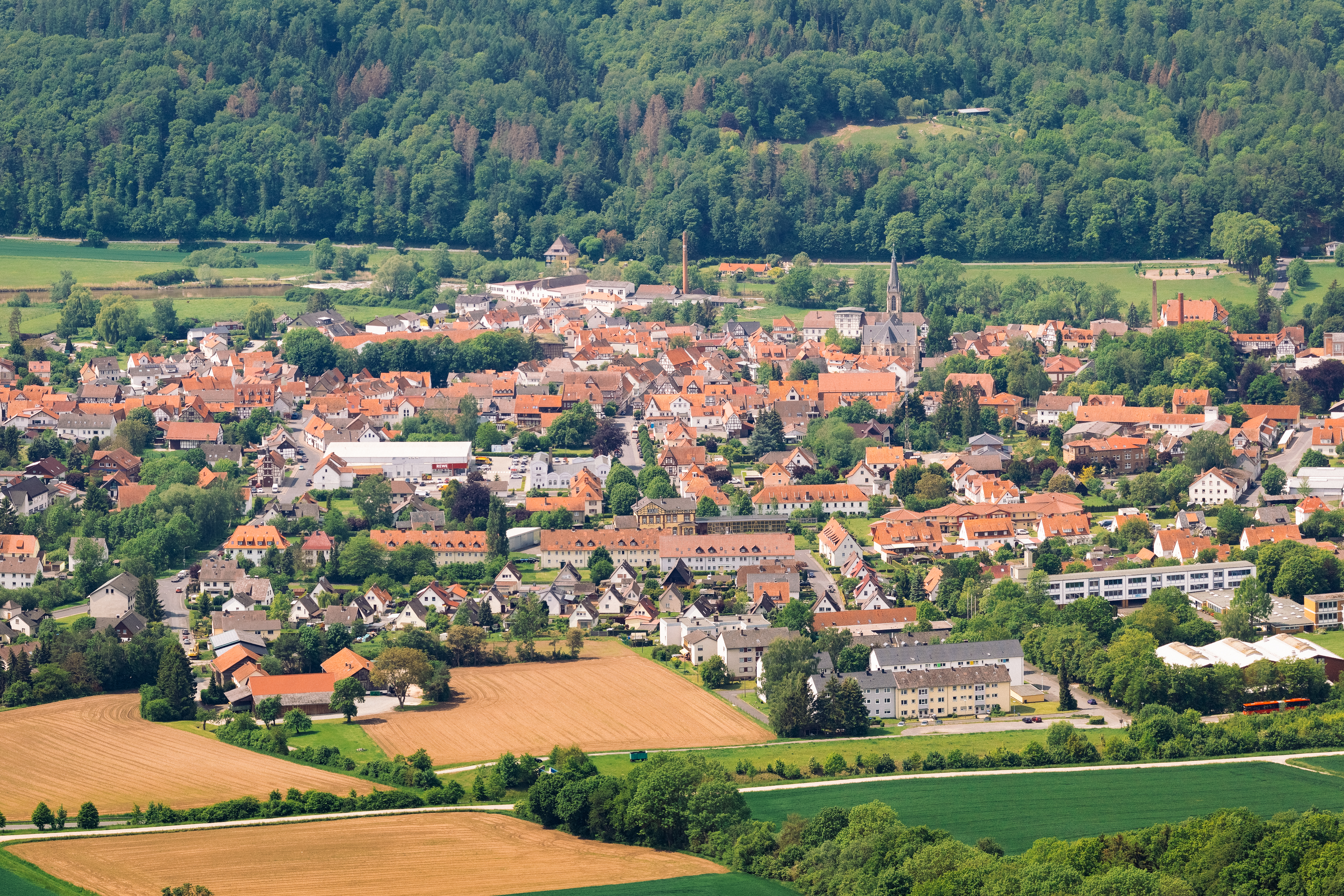 Ausschnitt eines Panoramas vom Plesseturm, dass den Stadtkern von Wanfried zeigt.